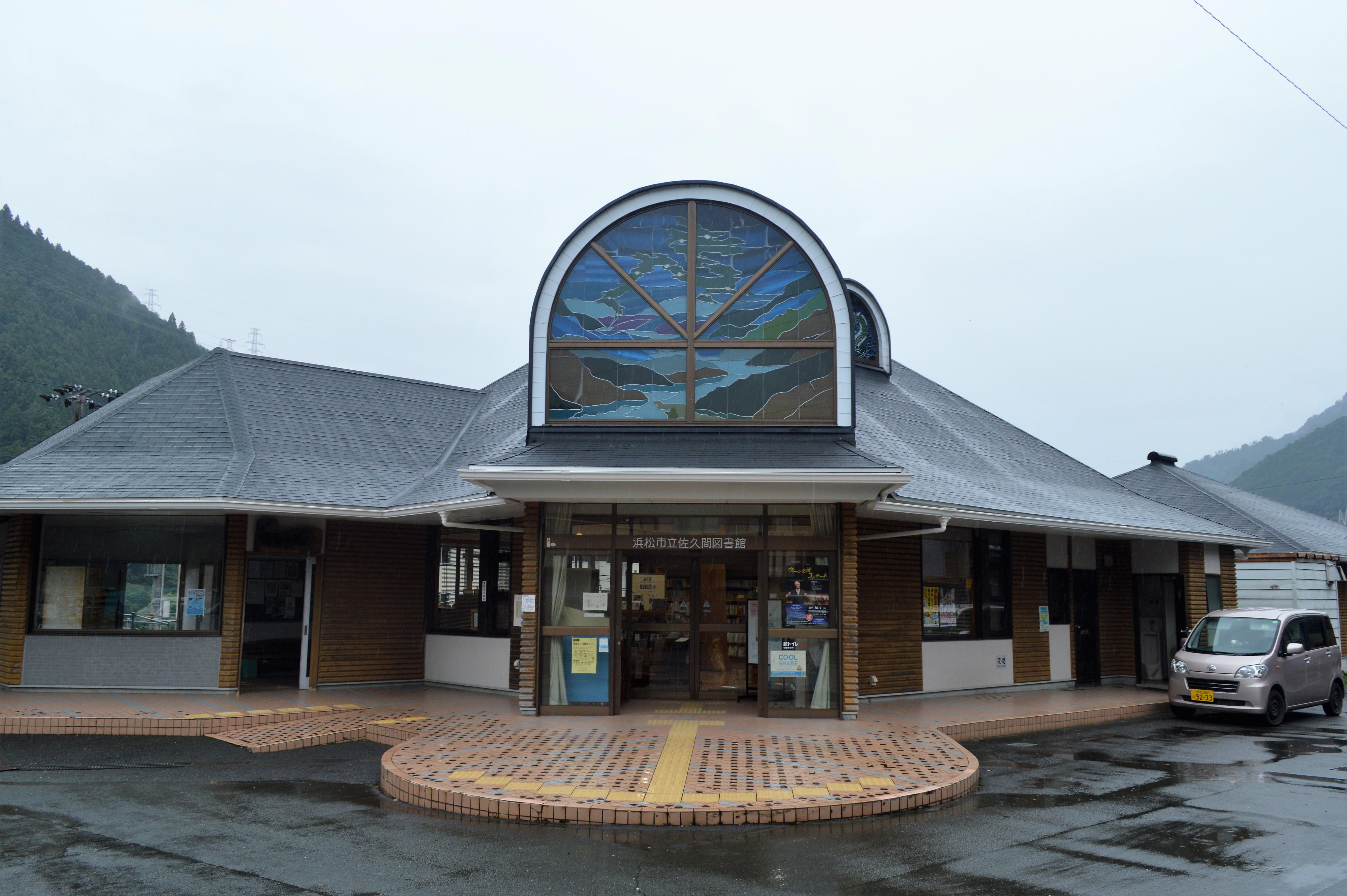 浜松市立佐久間図書館。